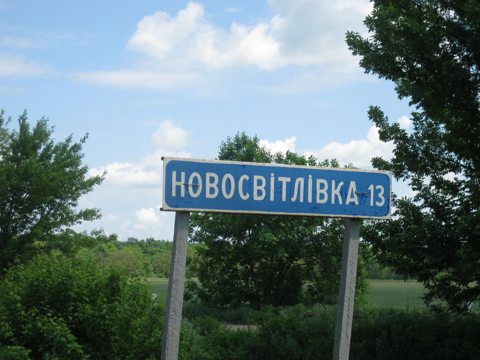 Указатель в сторону Новосветловки